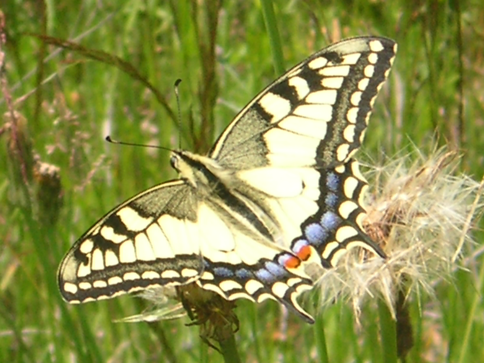 Fluture coada de randunica in Muntii Sureanu-jud.Hunedoara-Romania